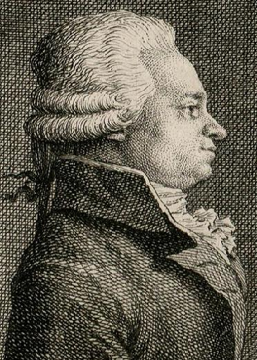 Jean-Louis, Claude Emmery de Grozyeulx (1742-1823), avocat à Metz. Député du tiers aux Etats-Généraux de 1789 par le bailliage de Metz. En 1791, président de l'Assemblée constituante, juge au tribunal de cassation, député de la Seine au Conseil des Cinq-Cents, prit une part active à l'élaboration du Code civil